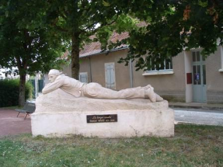 Ernest Nivet (1871-1948), Le Berger couché à Levroux (France).